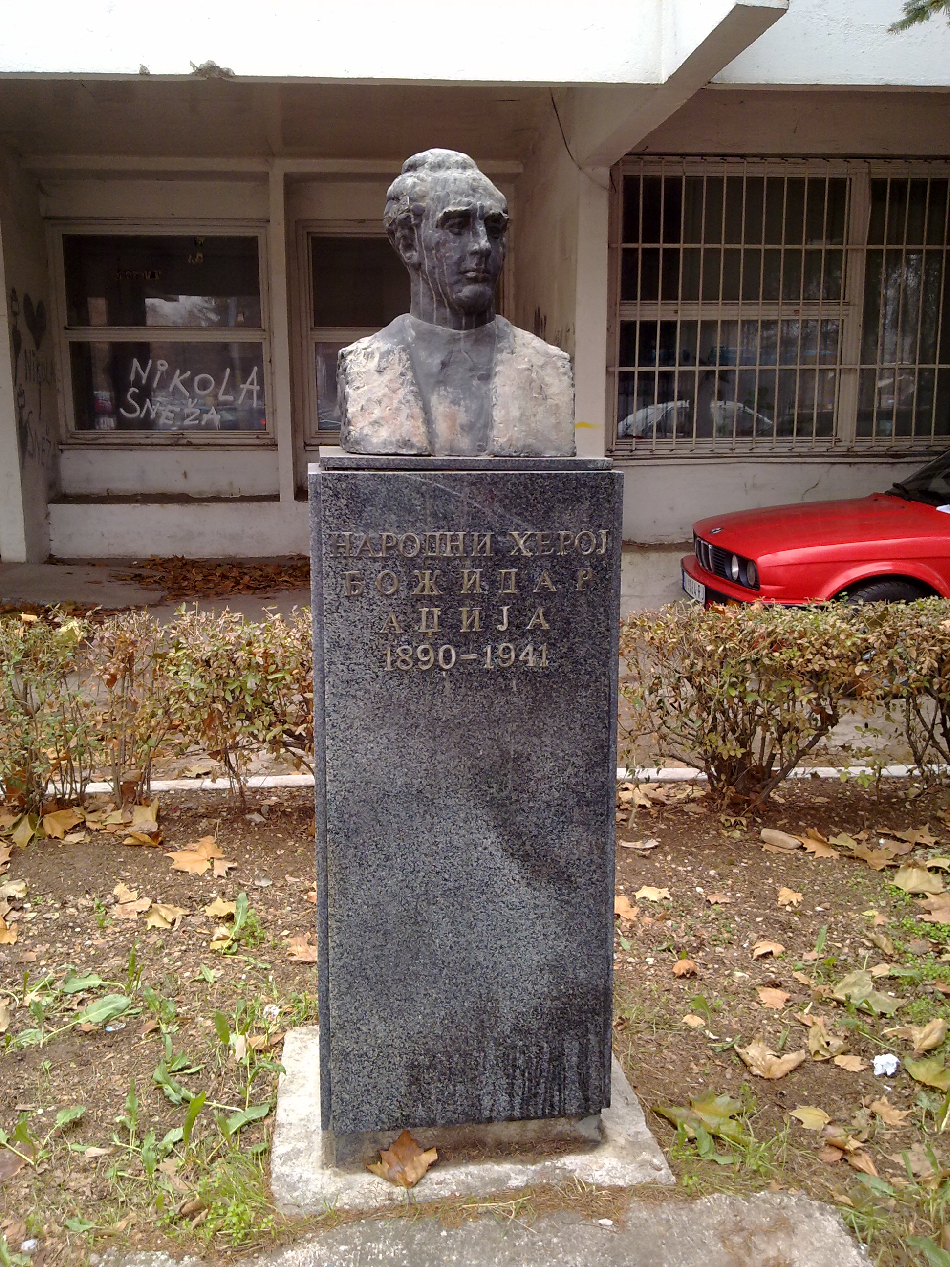 Биста Божидара Аџије у Нишу, децембар 2012. (Сликао Mstudiodf)